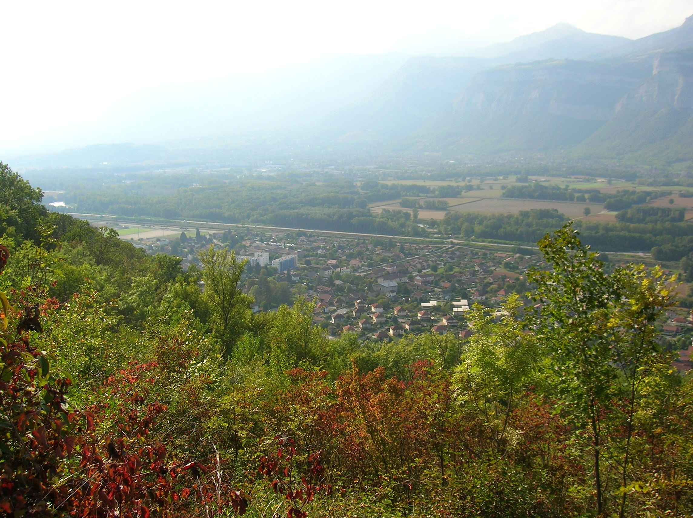 panorama de Froges et Le Champ-près-Froges depuis Champ le Haut. Le Champ-près-Froges, Isère, AuRA, France.